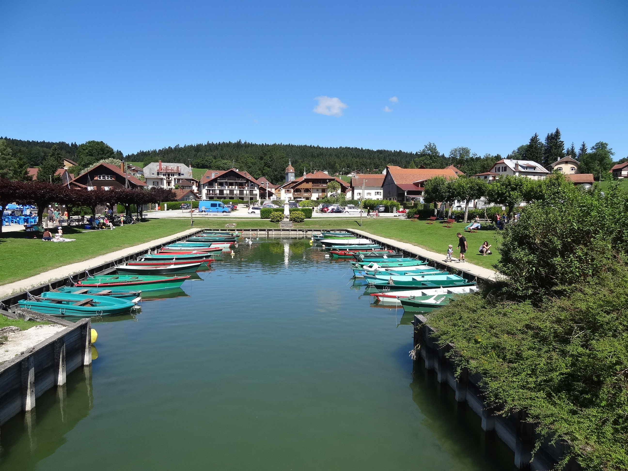 Saint-Point-Lac (Doubs) - le petit port